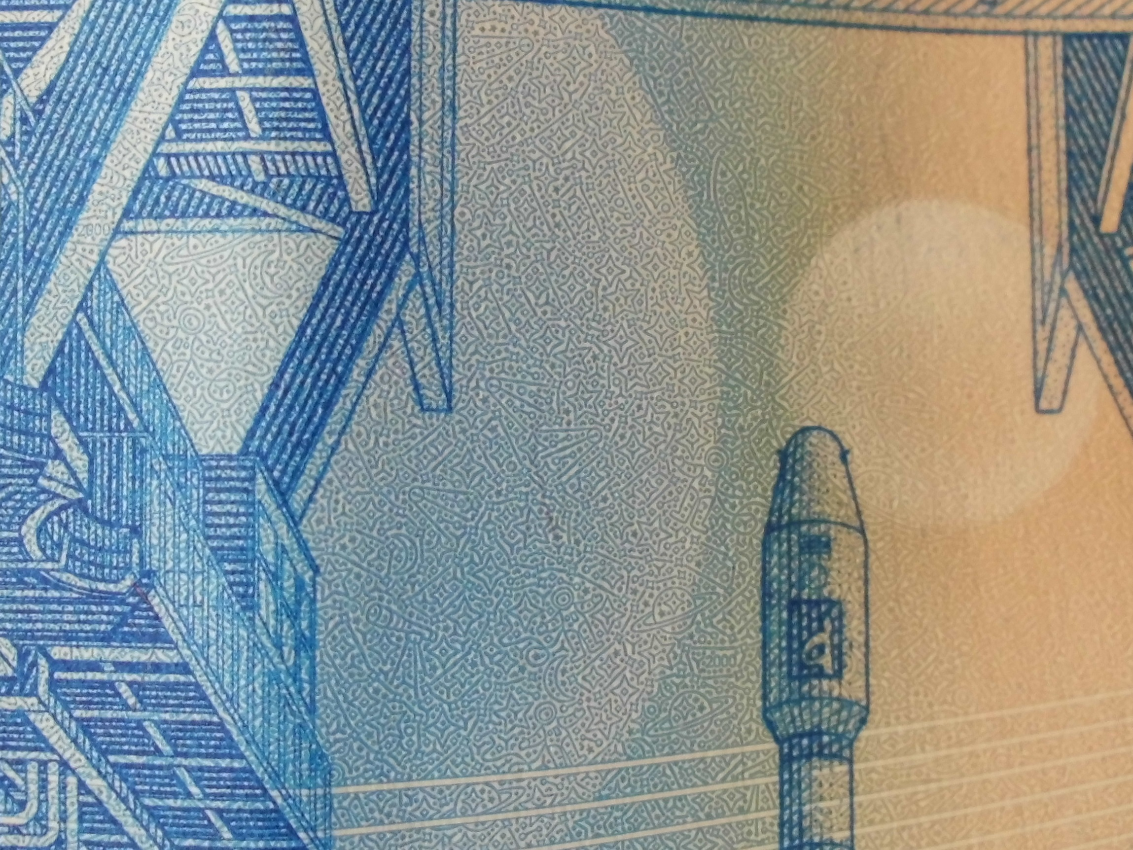 2000 российских рублей образца 2017 года. Реверс, посередине. Микрорисунки на космическую тематику